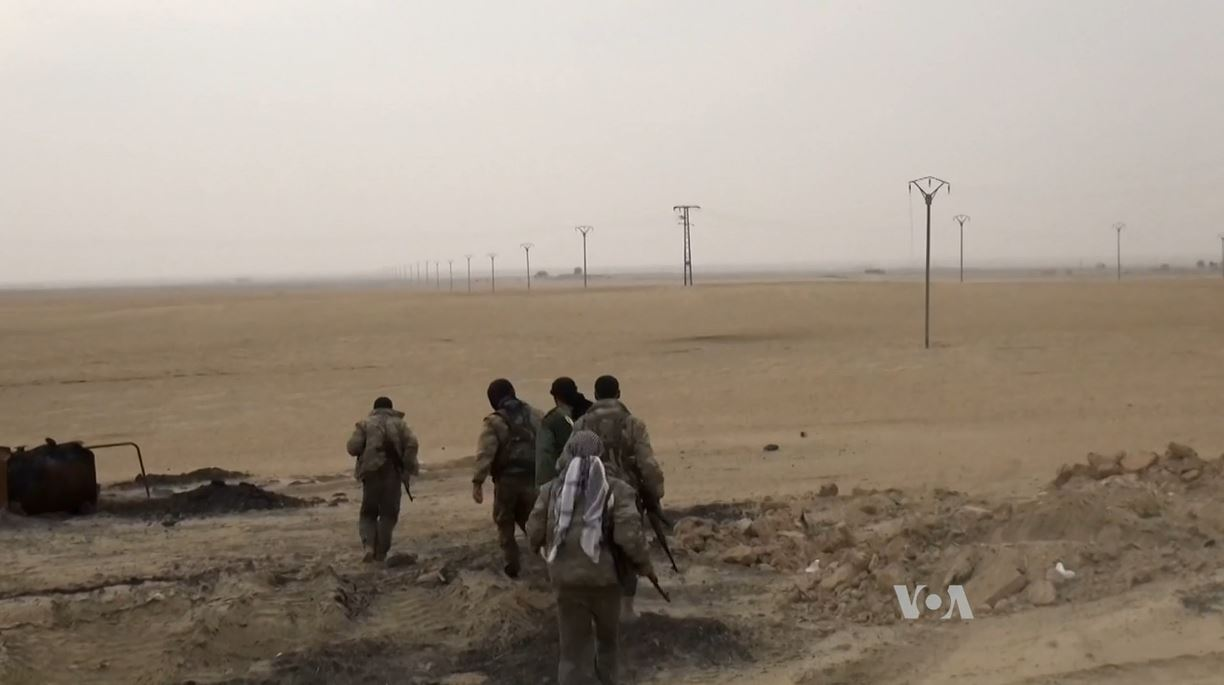 Membres des YPG à la bataille de al-Hol en Syrie en 2015.